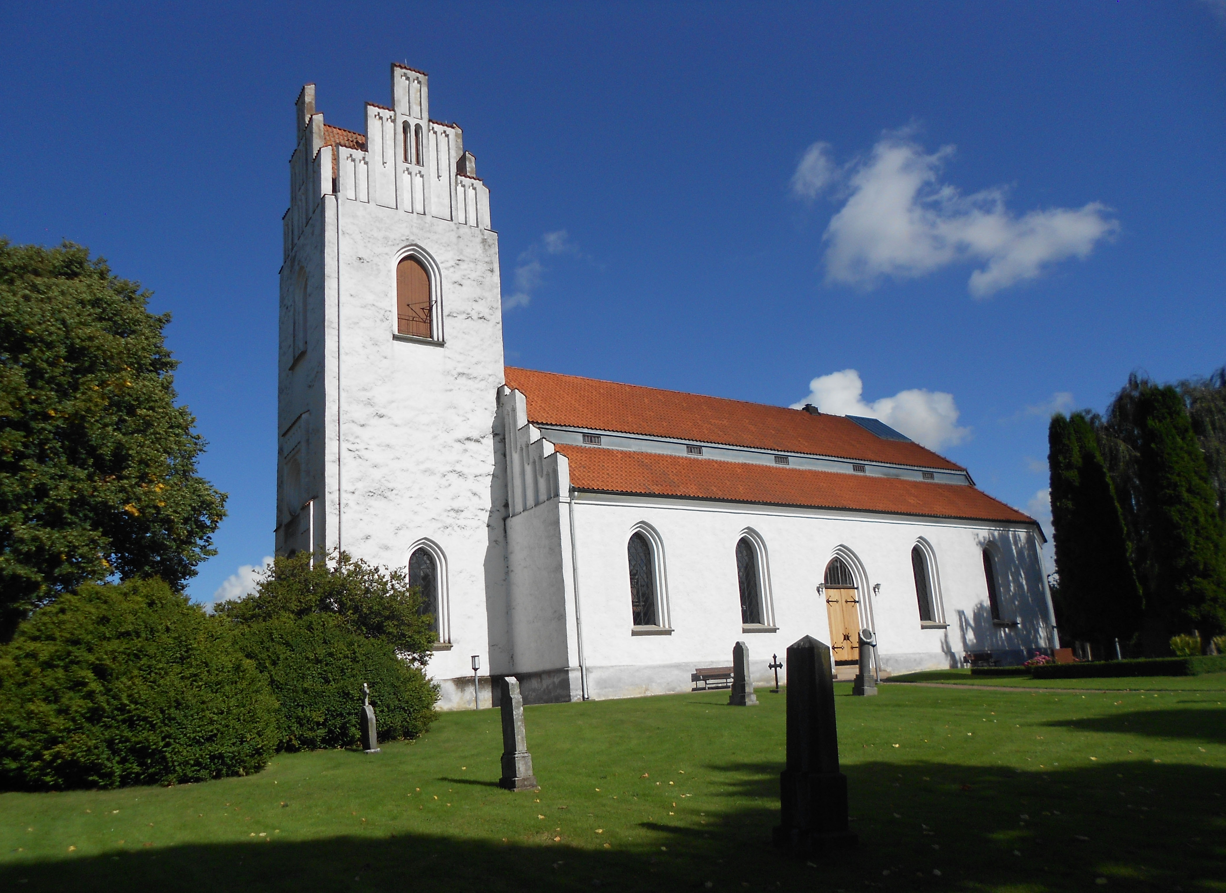 Billeberga kyrka.